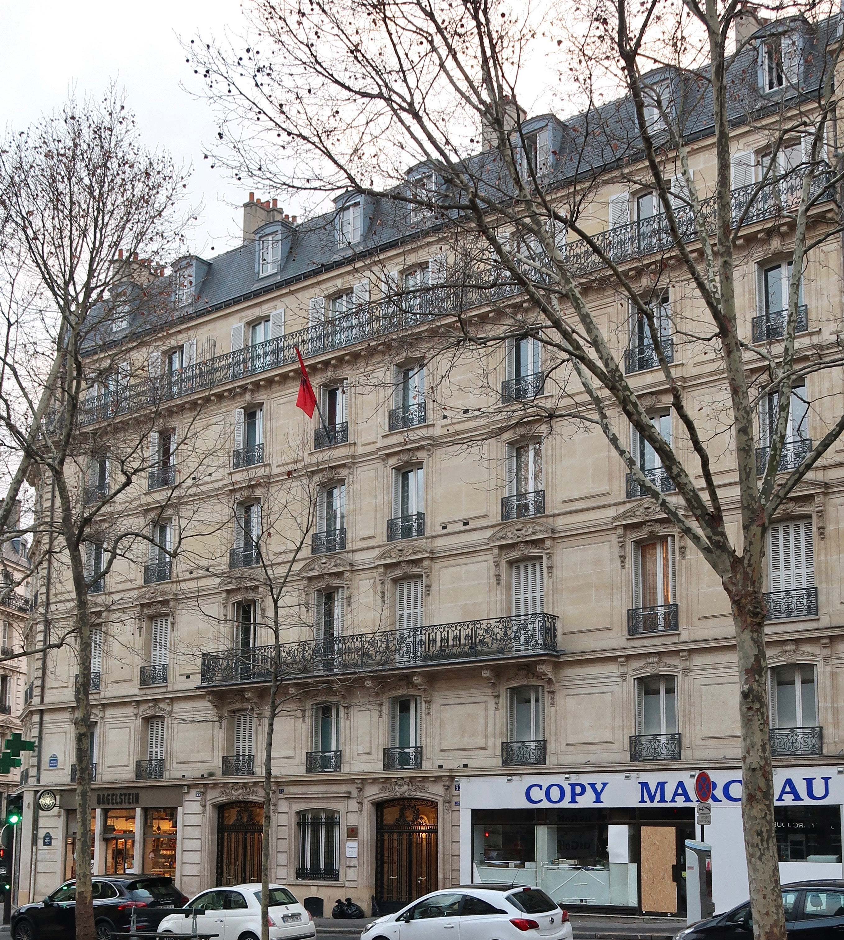 Ambassade d'Albanie en France, 57 avenue Marceau (Paris 16e).